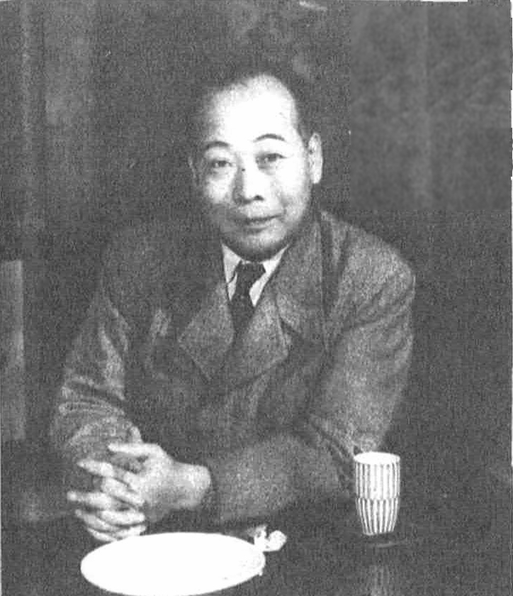 読売新聞社『家庭よみうり』372号（1954年）より山川惣治